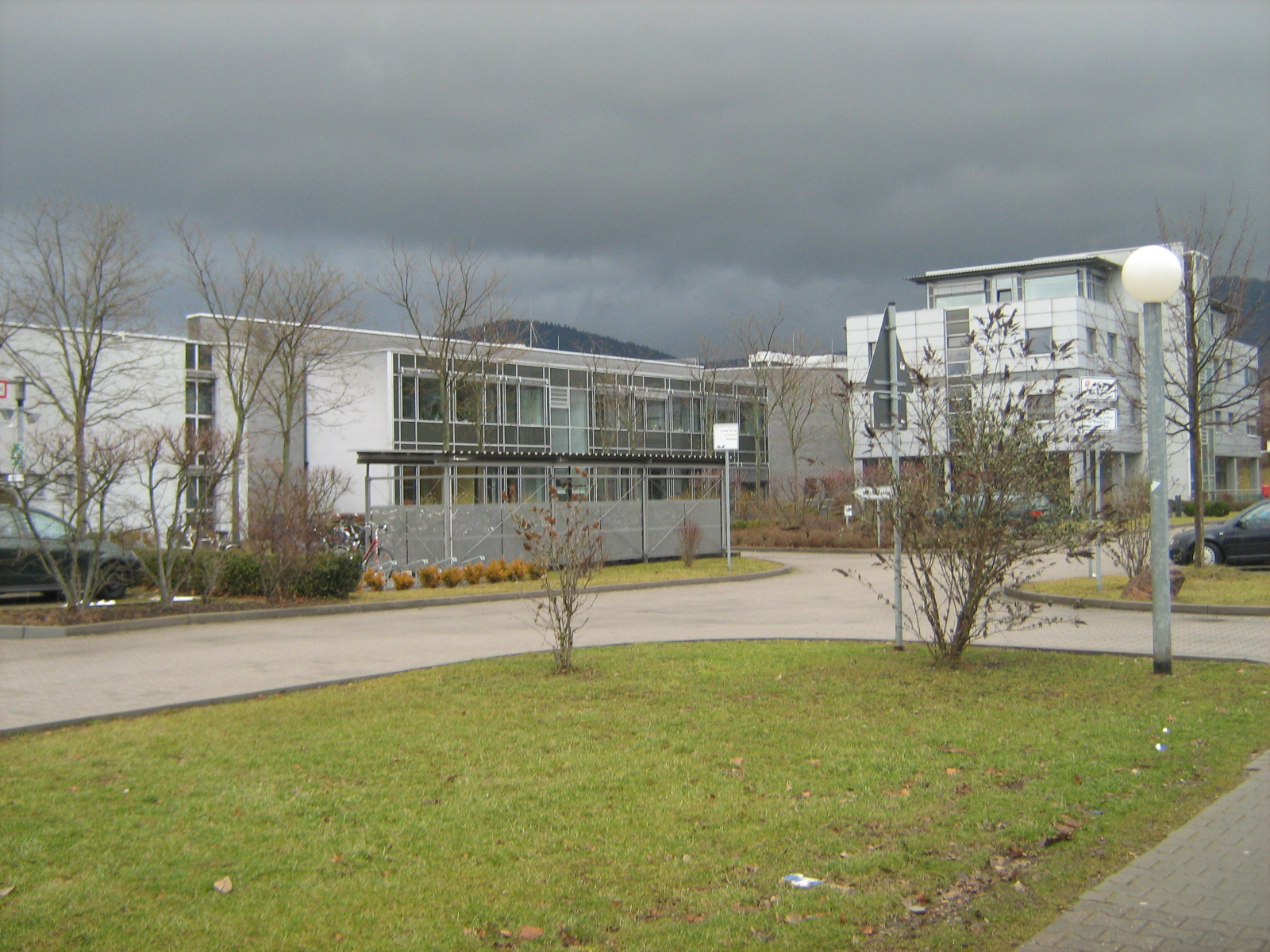 MPI für ausländisches öffentliches Recht und Völkerrecht auf dem Campus der Universität Heidelberg